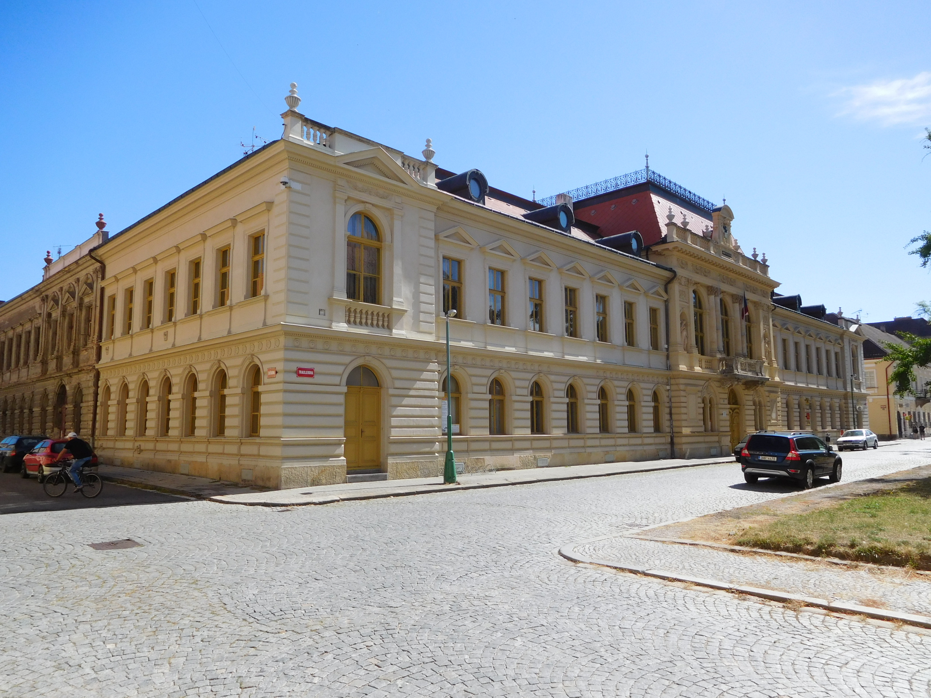 Josefov - Masarykovo náměstí 110, Nová radnice